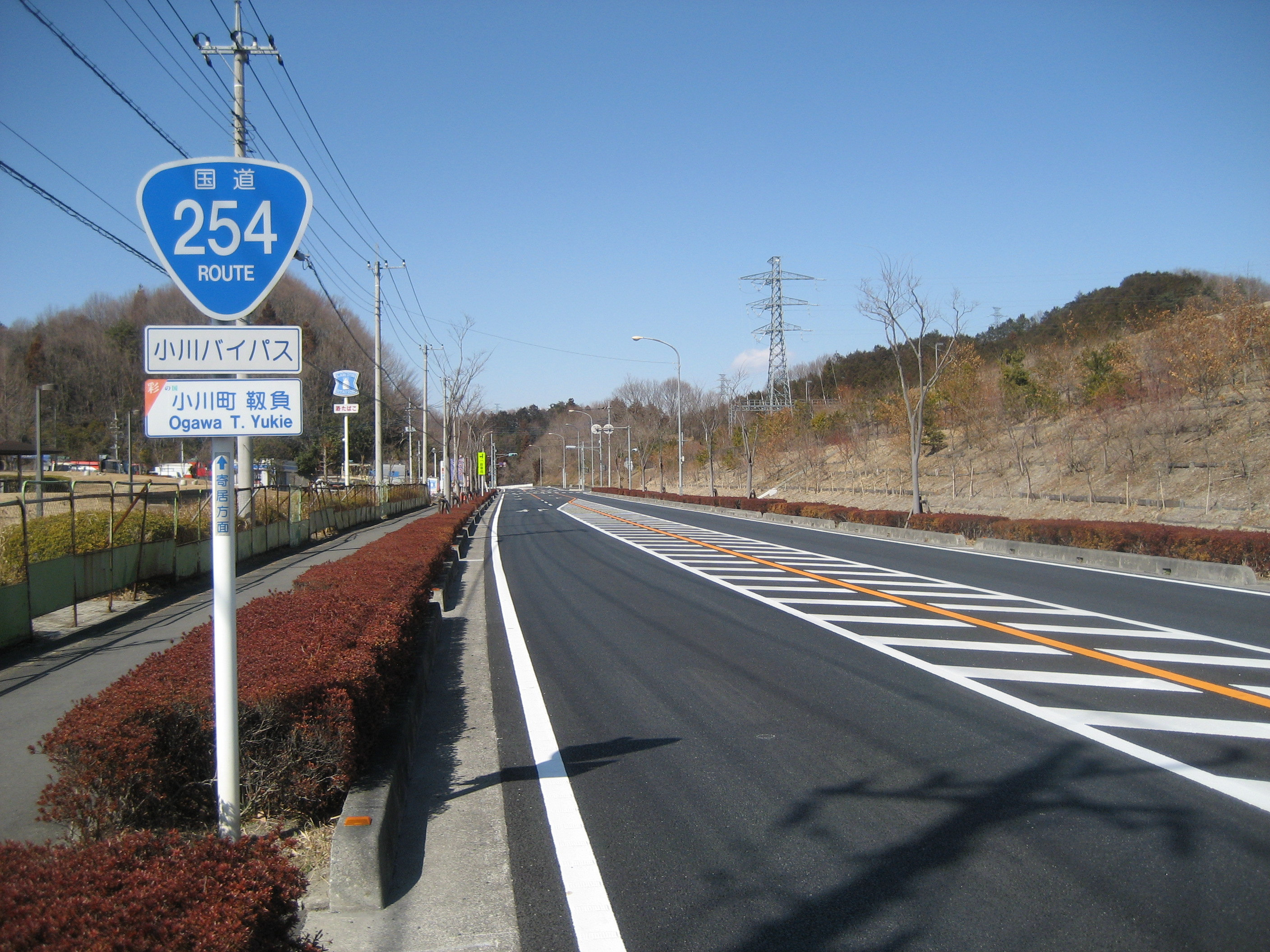 国道254号線小川バイパス（埼玉県比企郡小川町靭負付近・寄居方面を撮影）